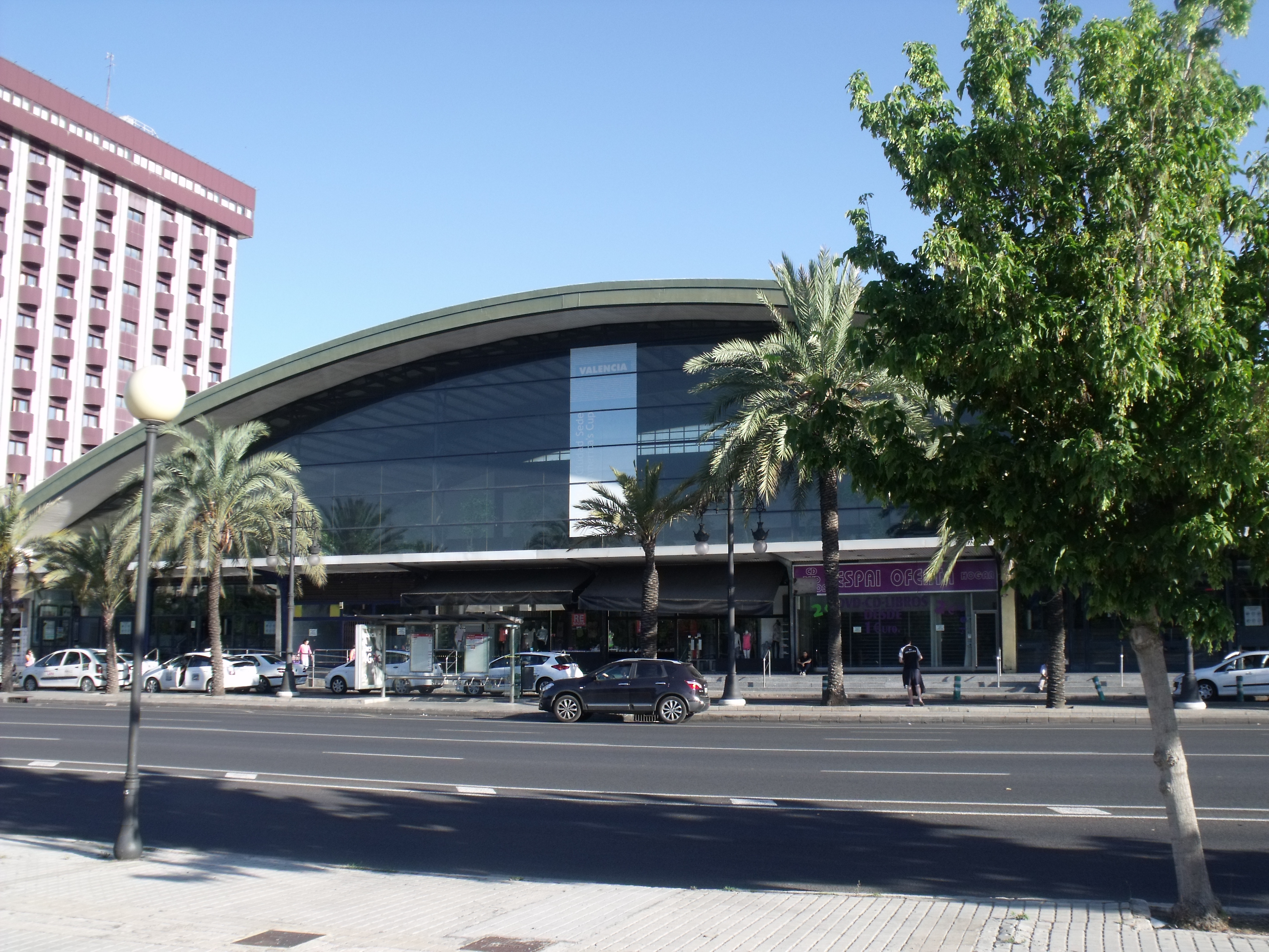 Estación de autobuses de Valencia.